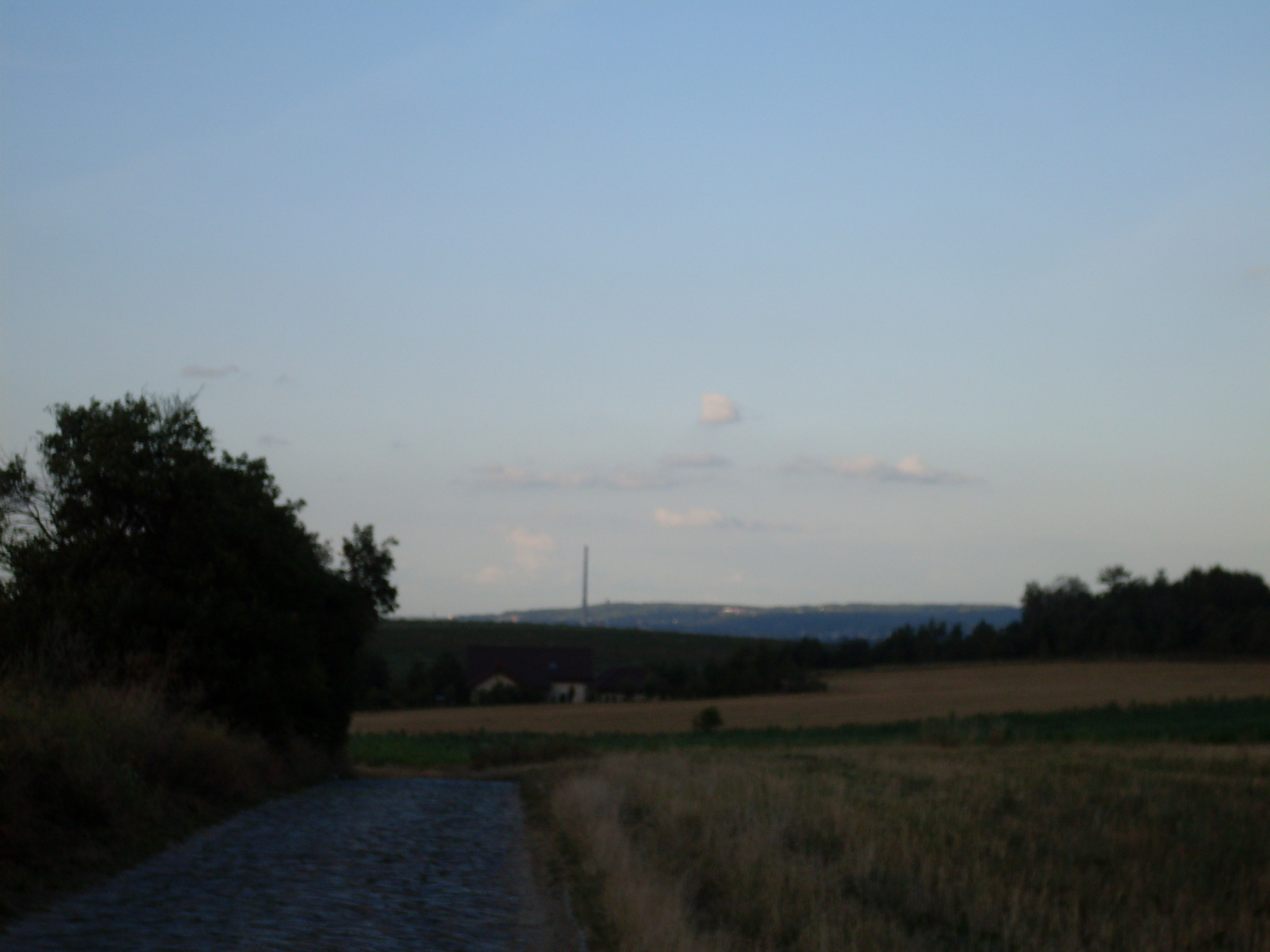 Wzniesienia Szczecińskie w okolicy Kamieńca